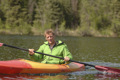 portrait